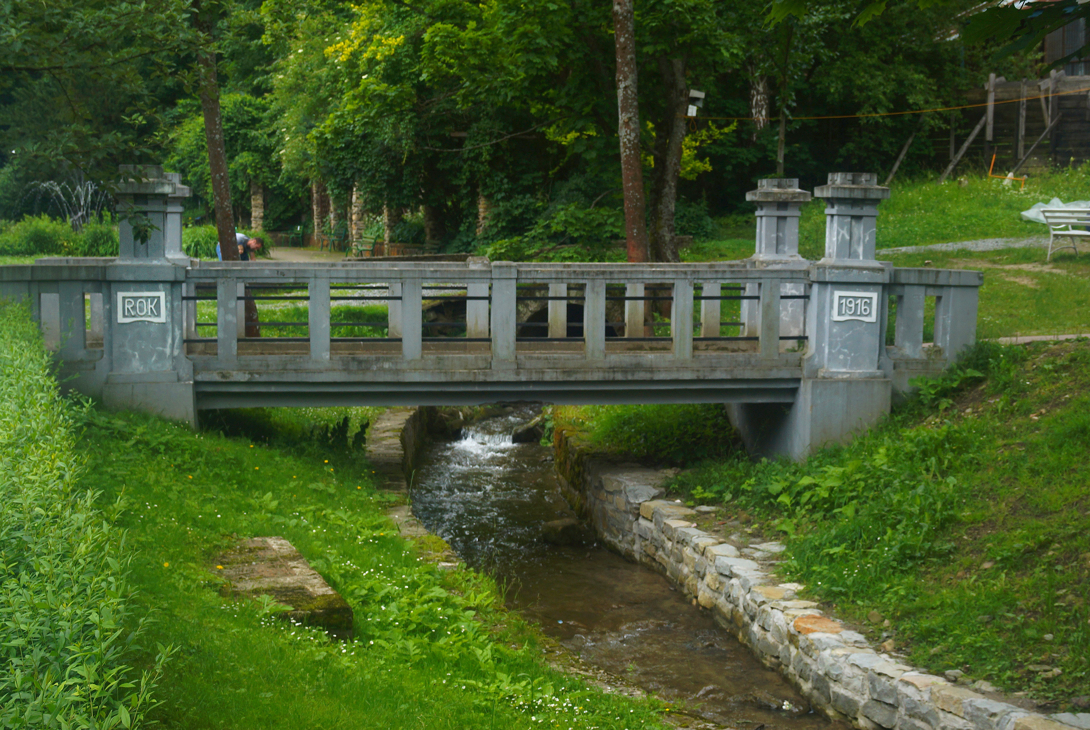 Криниця-Здруй, парк